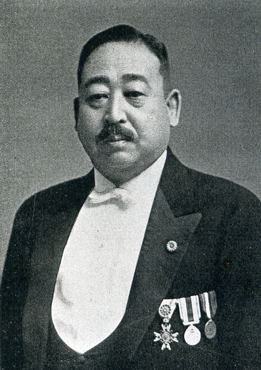 この写真は、広瀬為久（1876-1941）の写真です。